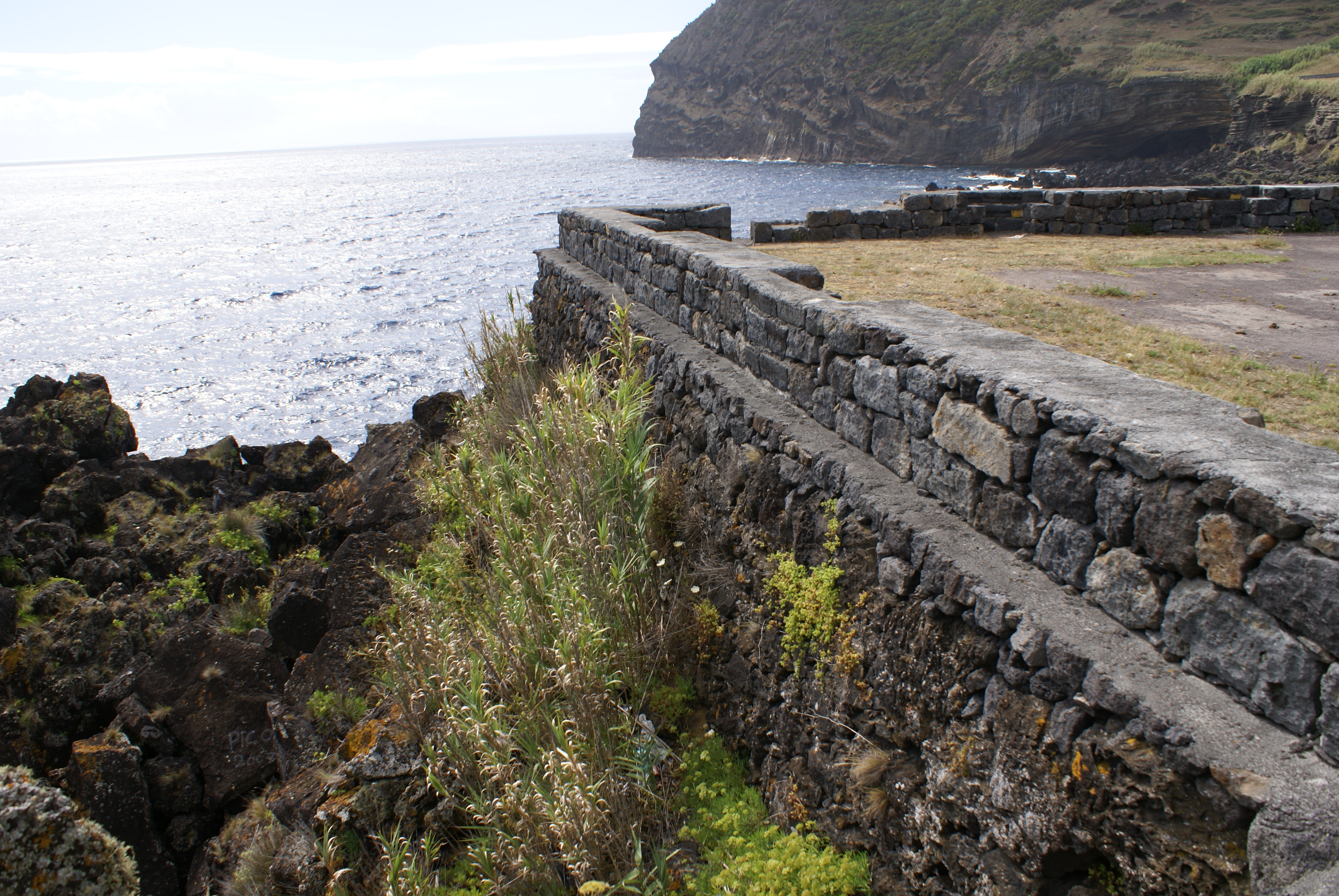 Forte da Preguiça, muralha, Velas, ilha de São Jorge, Açores